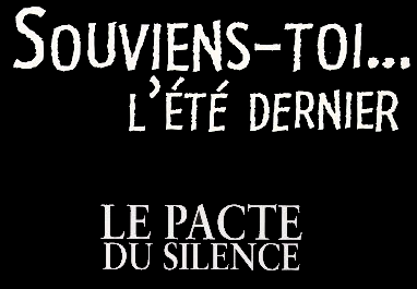 Logo du film Le pacte du silence